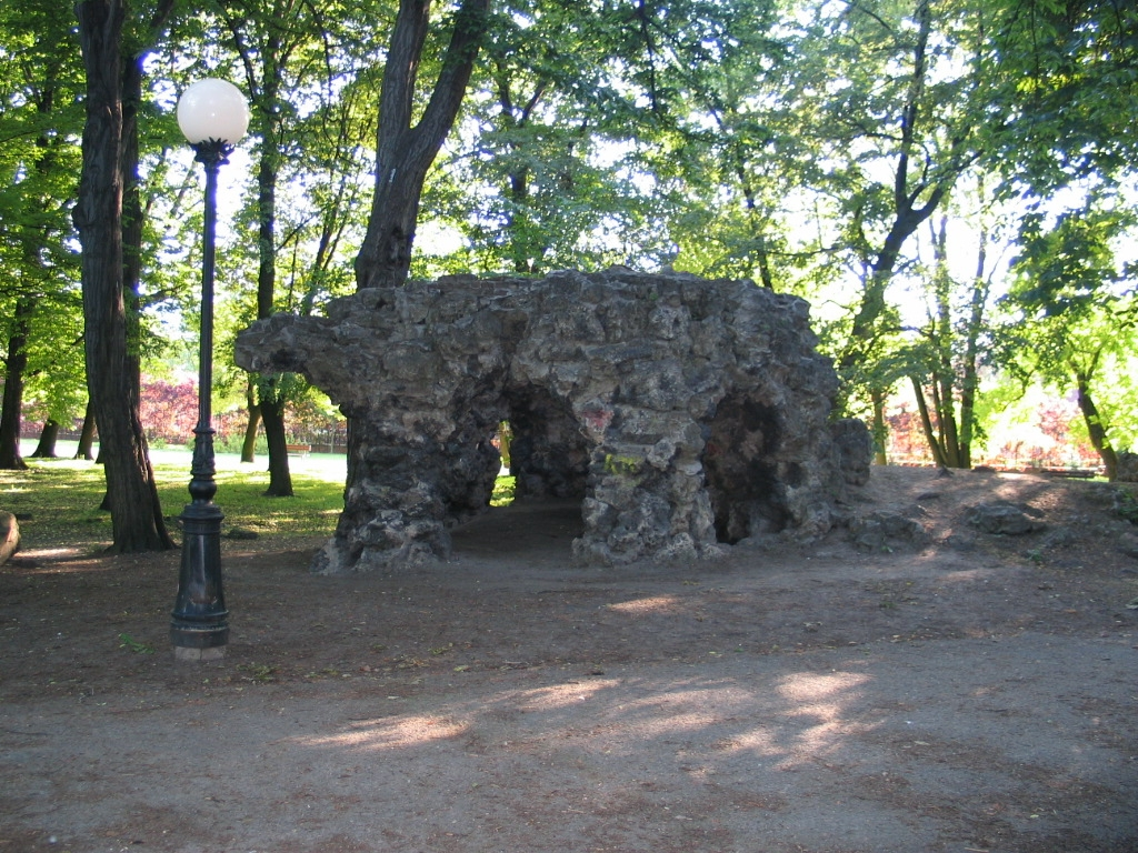 Park Źródliska Łódź